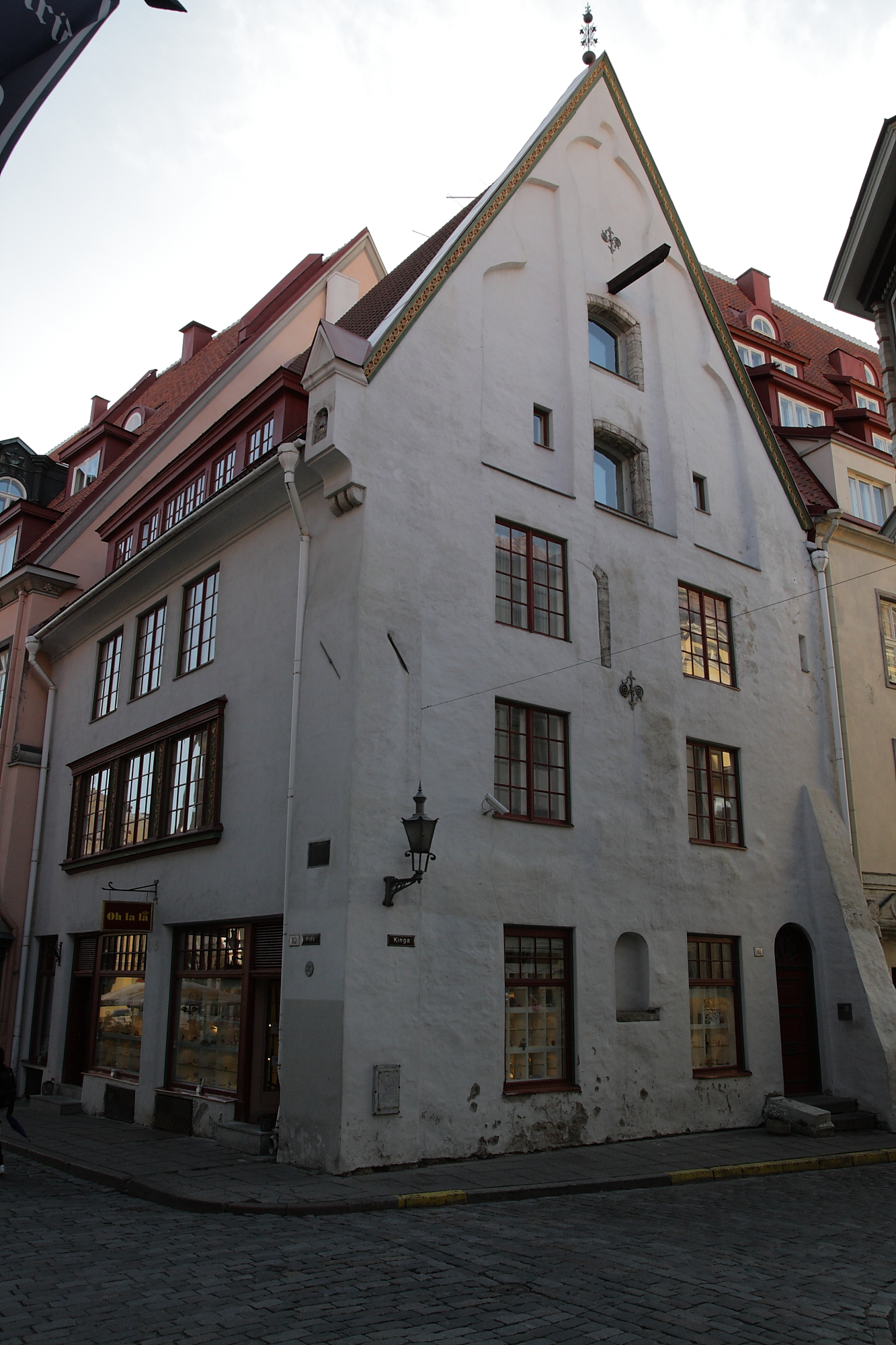 Tallinn, elamu Kinga 10 fassaad, 15.saj., 1923